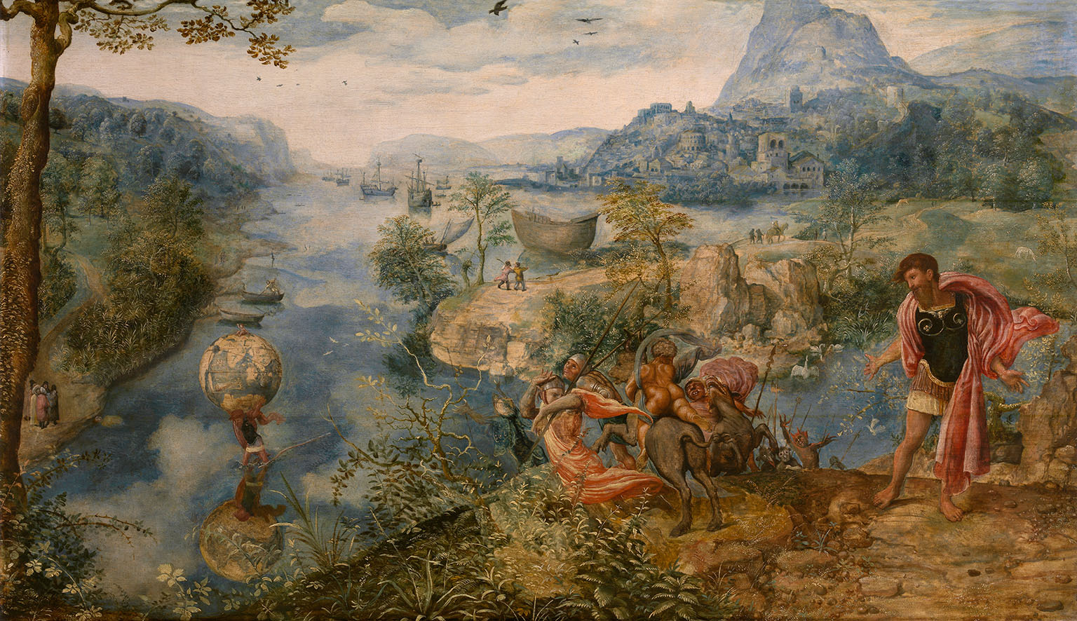 San Criistóbal, atribuido a Jan van Amstel. Primera mitad del siglo XVI. En la esquina inferior izquierda, San Cristóbal lleva un gran globo terráqueo sobre el que está subido el Niño Jesús.